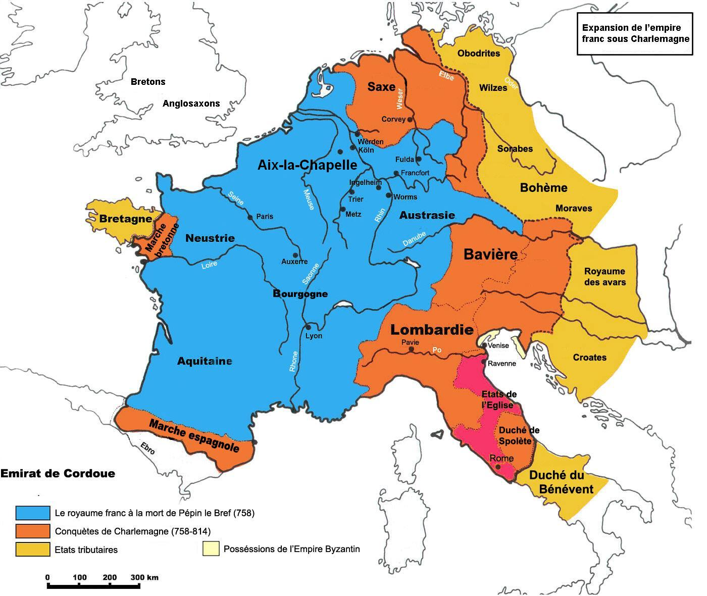 modification de l'image de cyberprout pour la page sur Aix-la-Chapelle